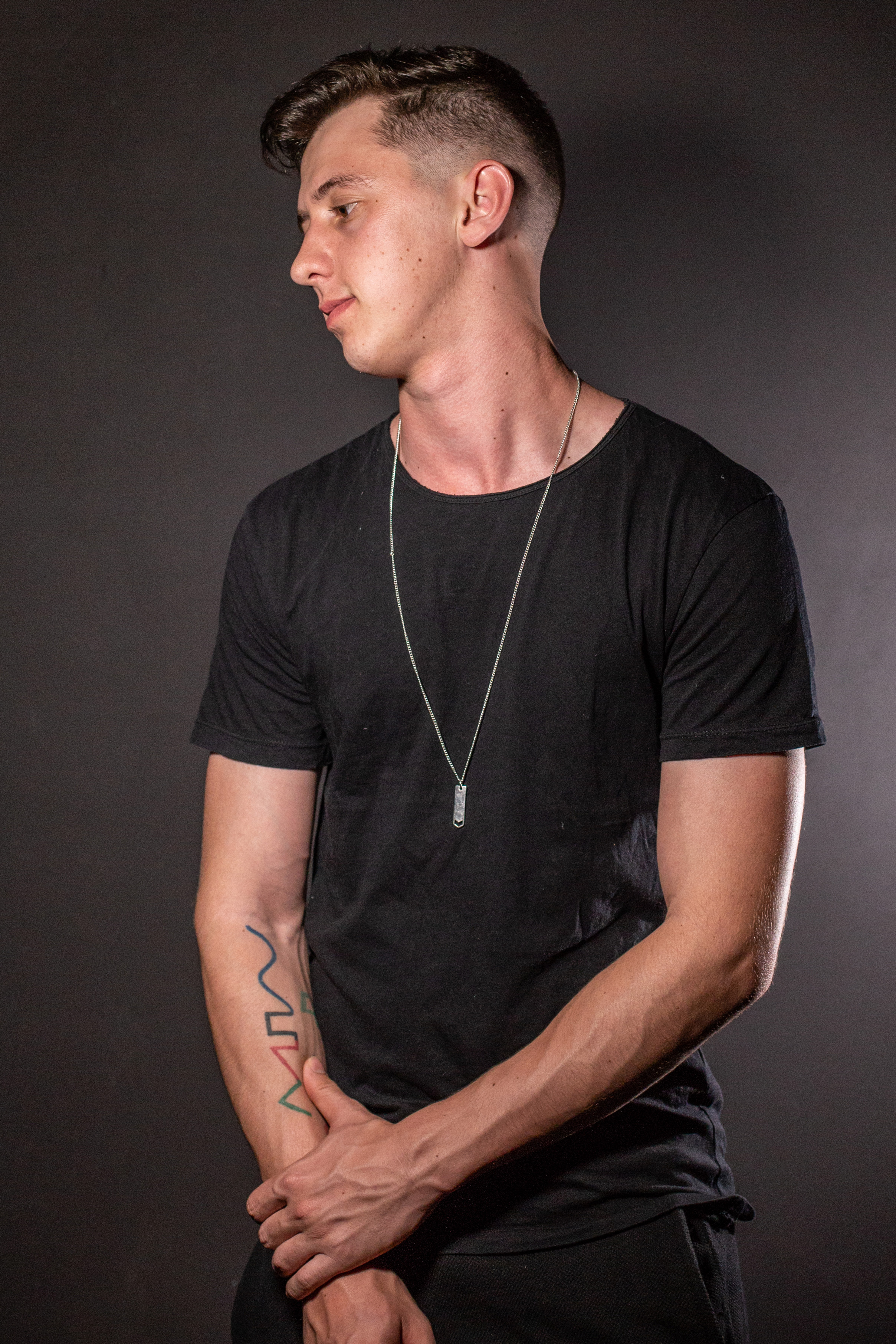 Glive em sessão de Press Kit